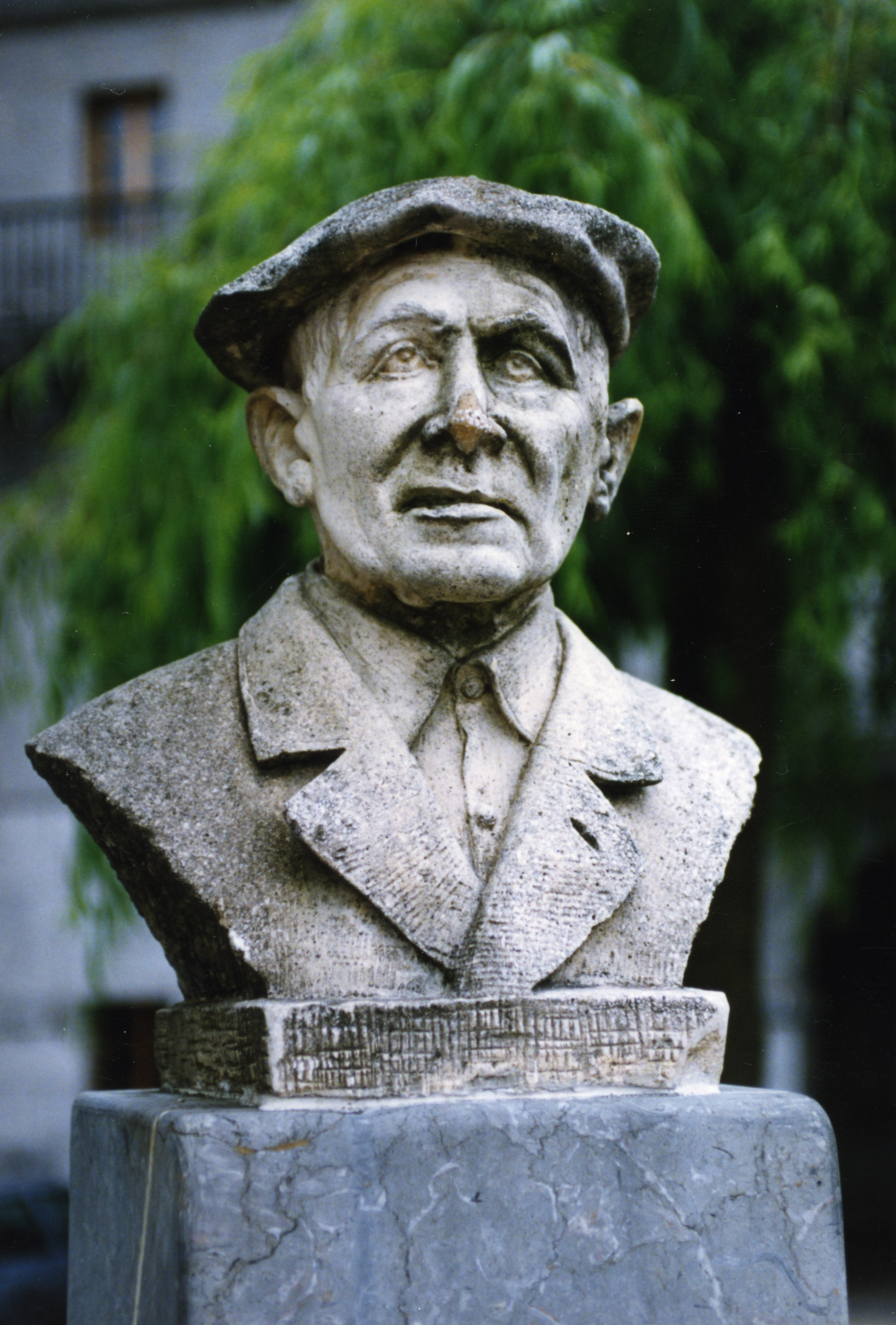 Pello Errotaren eskultura. Aiurri -1 zbk. 18. orr.